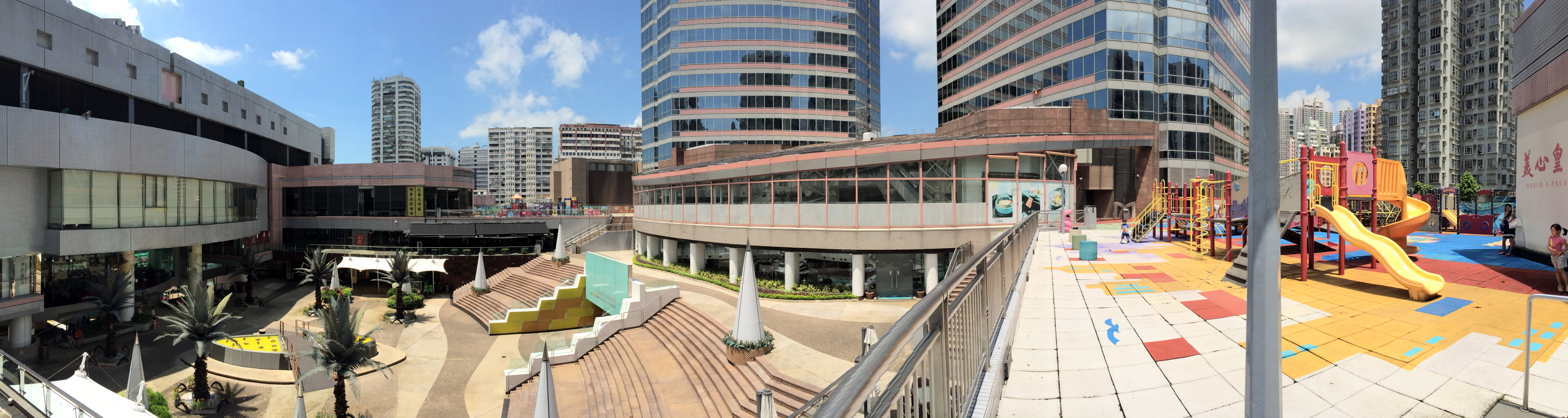 MetroPlaza Podium Pano